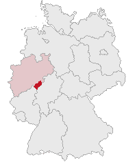 Kreis Siegen-Wittgenstein, North Rhine-Westphalia, Germany